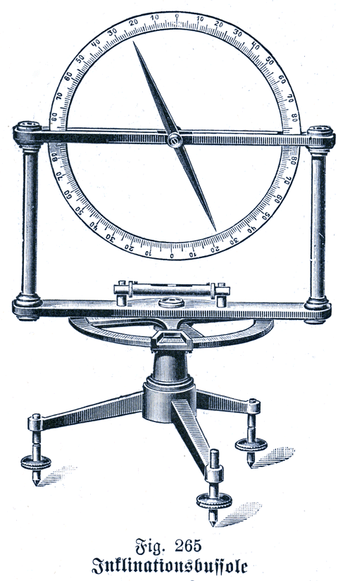 Inclinometer